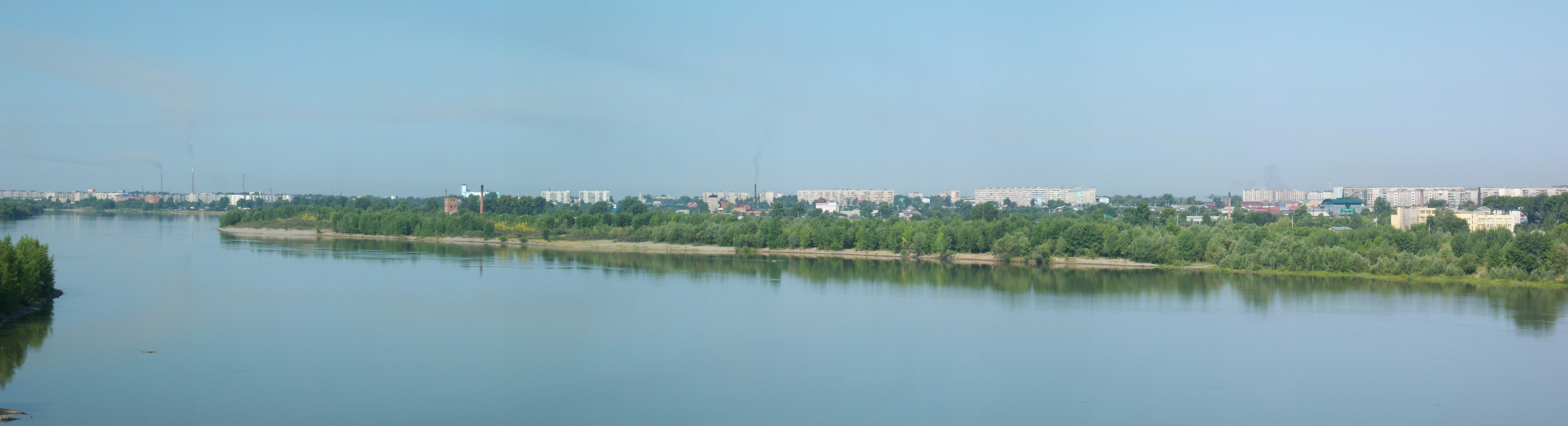 панорама города Бийска с моста